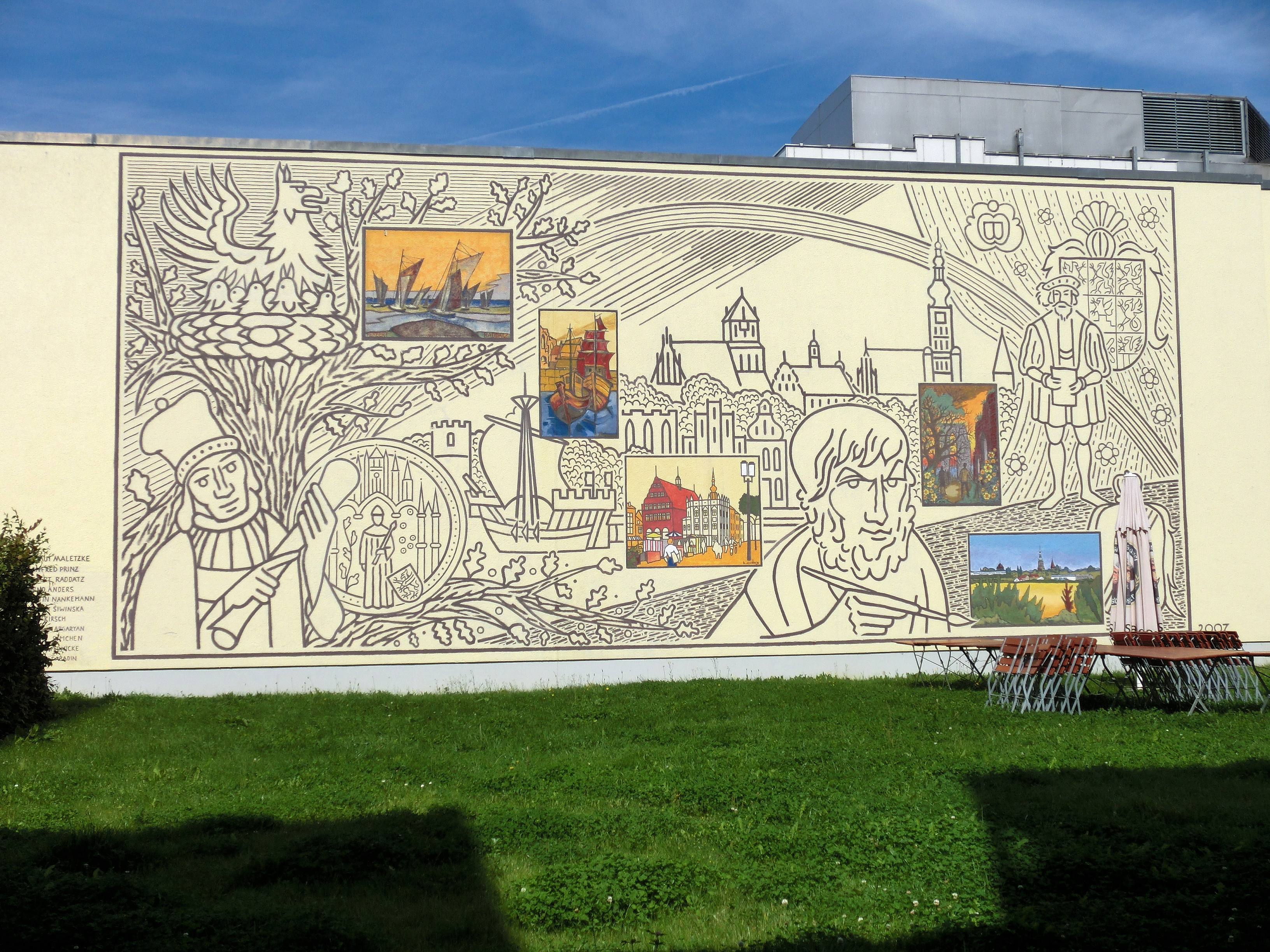 Greifswald, Lappstraße Wandgemälde